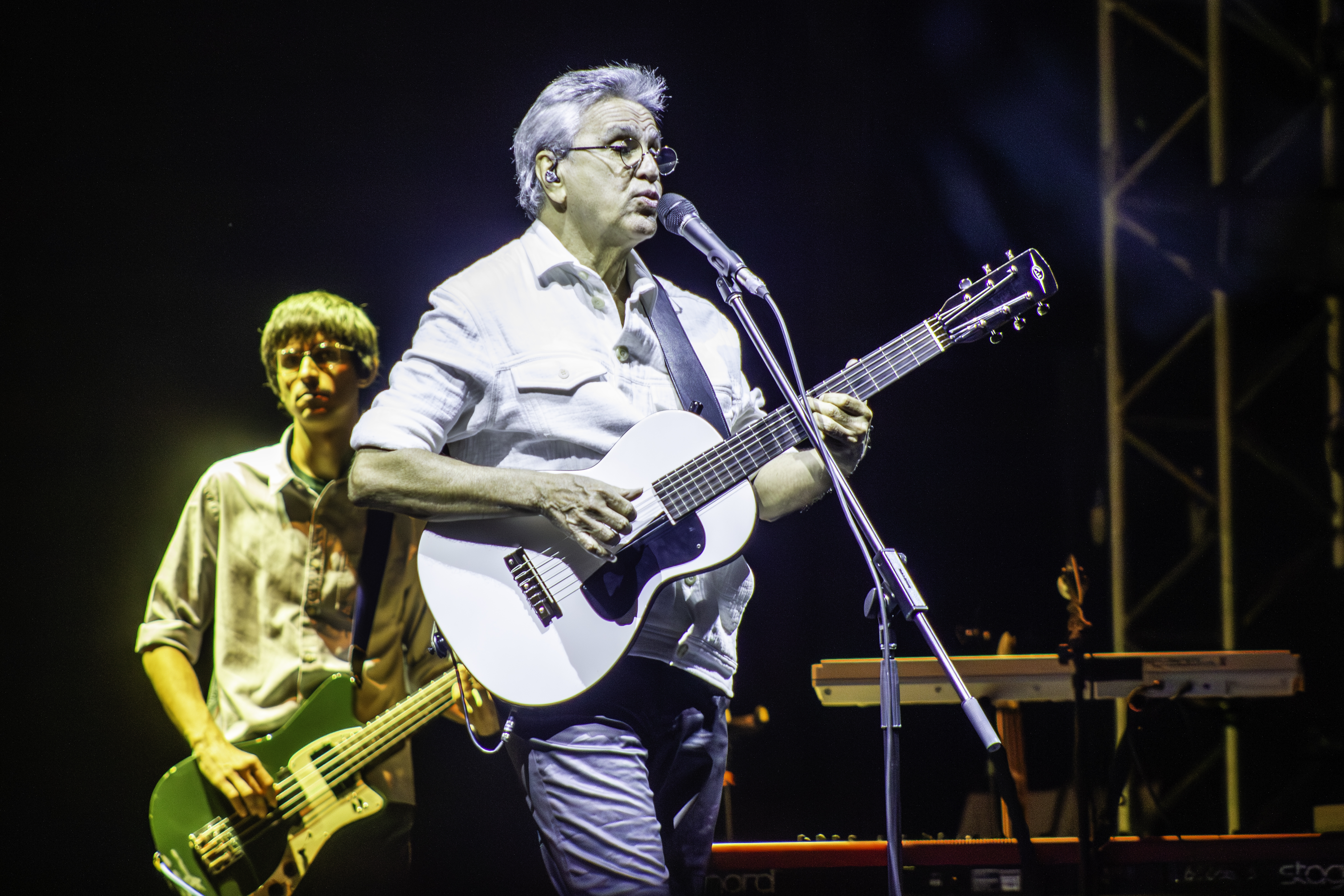 O músico brasileiro Caetano Veloso no NOS Primavera Sound 2014 de Porto.